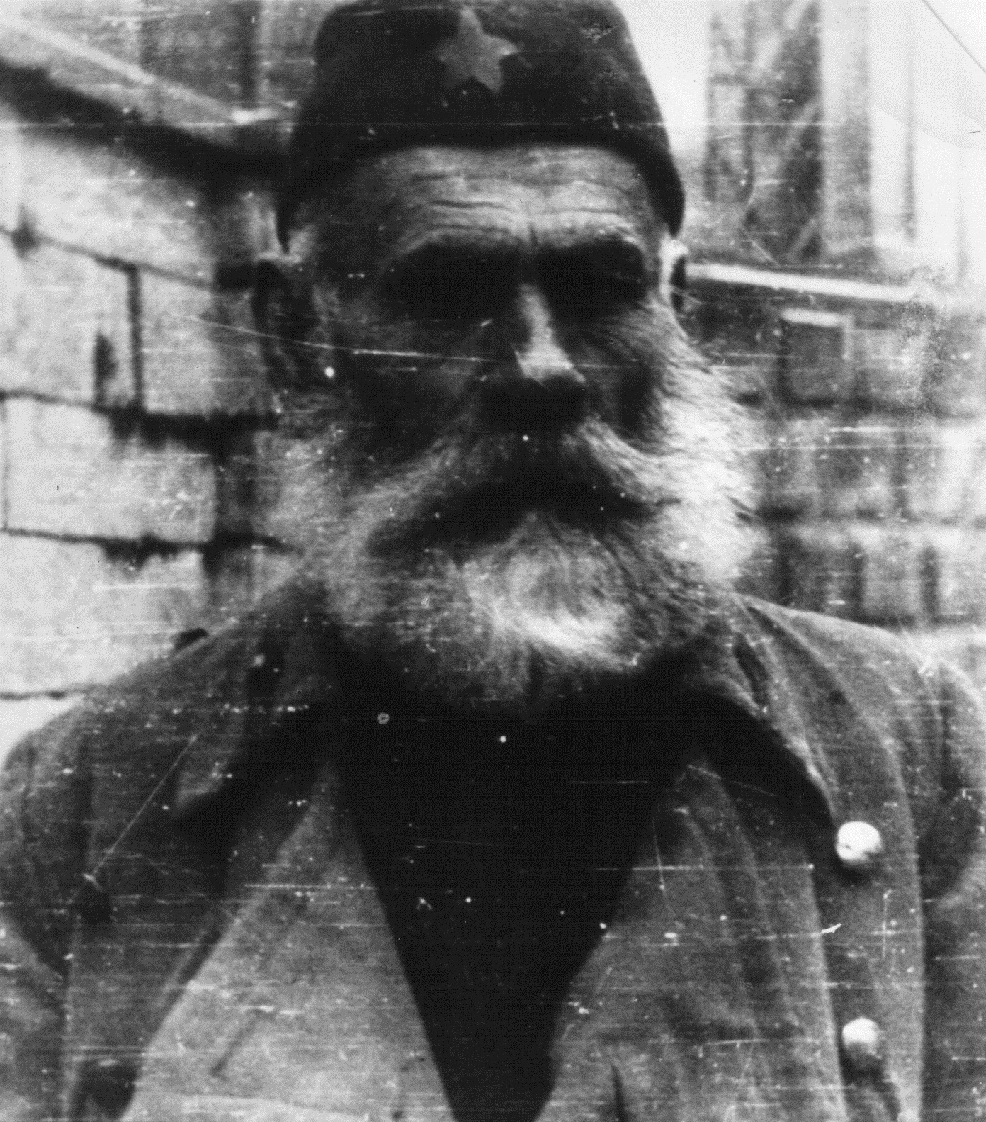 Đoko Pavićević (Do Pješivački, kod Nikšića, 6. maj 1872 — Nikšić, SR Crna Gora, 4. jun 1970), učesnik Narodnooslobodilačke borbe i narodni heroj Jugoslavije.